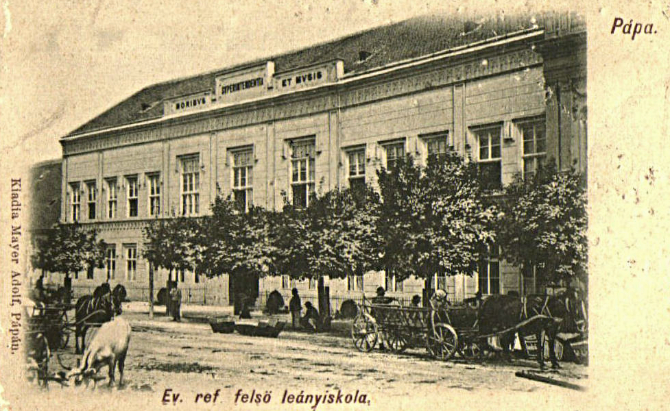 Post card depicting the old building of the Pápa Reformed College (today called 'Nátus') in the second half of the 19th century A Pápai Református Kollégium régi épülete (a mai 'Nátus') a 19. század második felében, egy korabeli levelezőlapon.